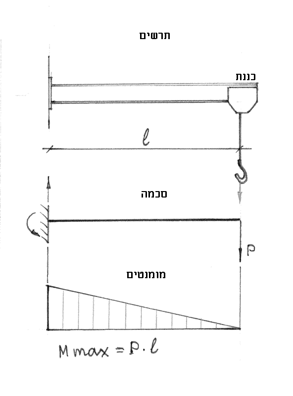 דוגמה למומנט כפיפה בקורת כננת